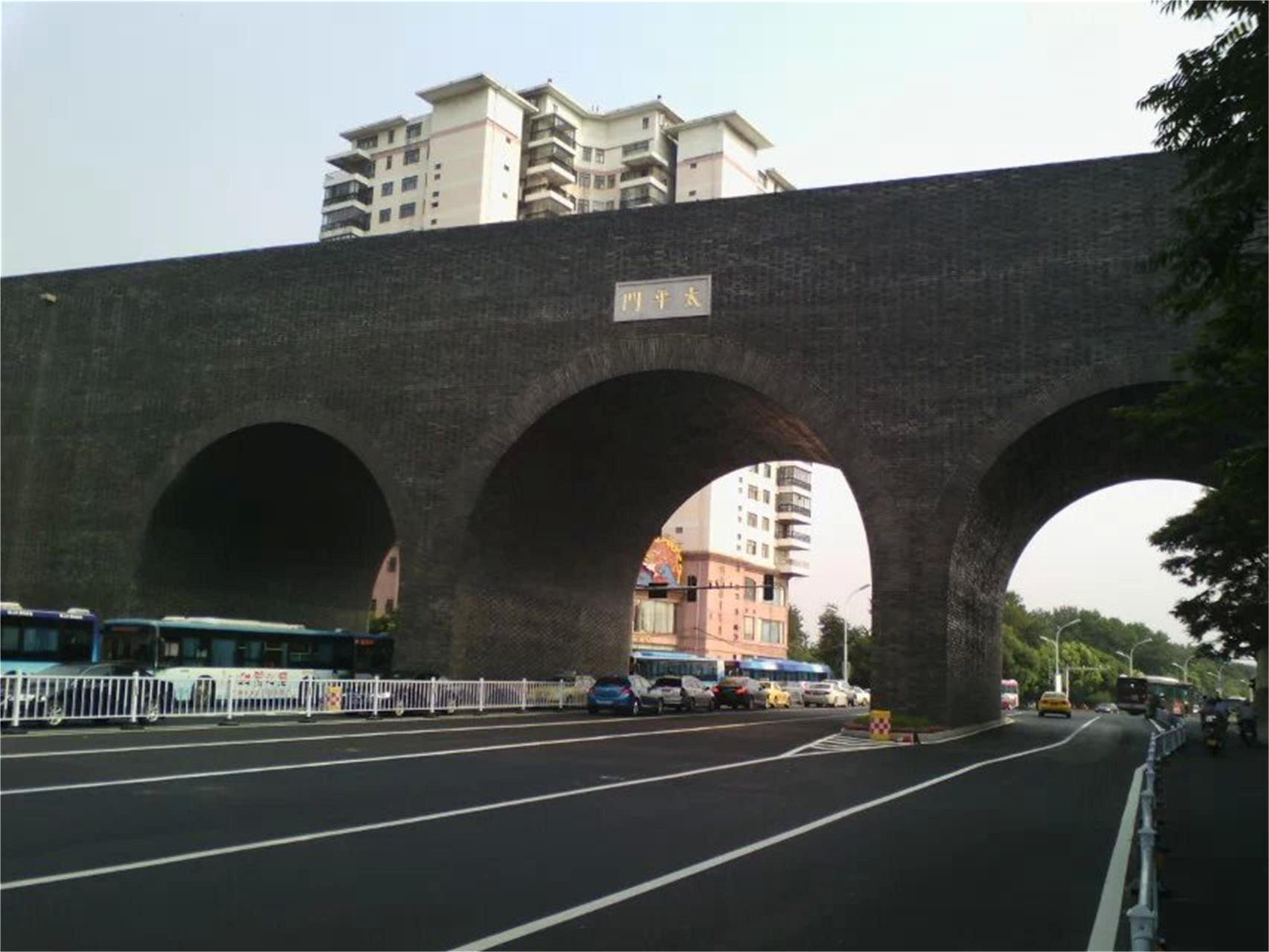 南京市太平门